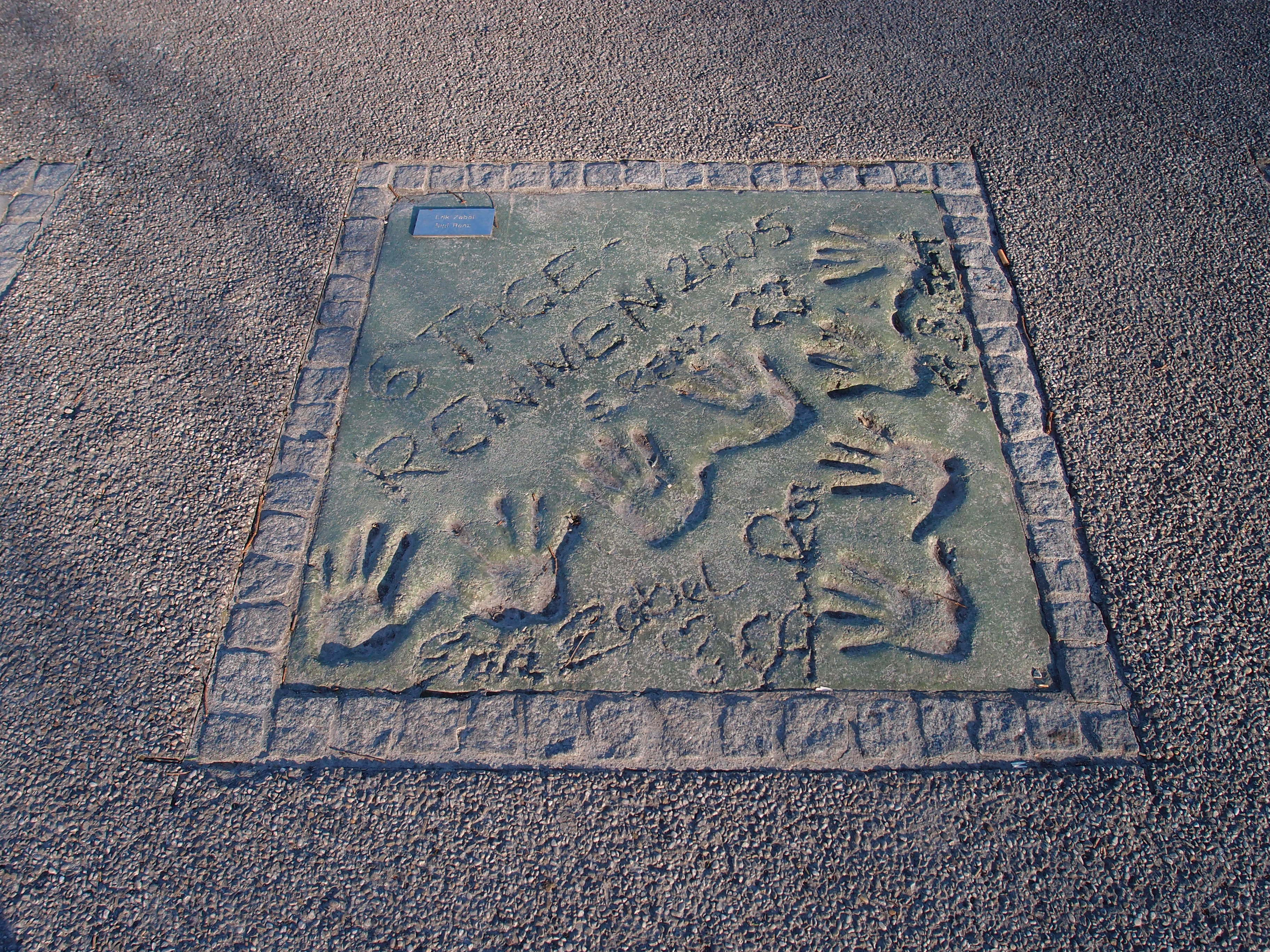 Eric Zabel, Munich Olympic Walk Of Stars im Olympiapark, München